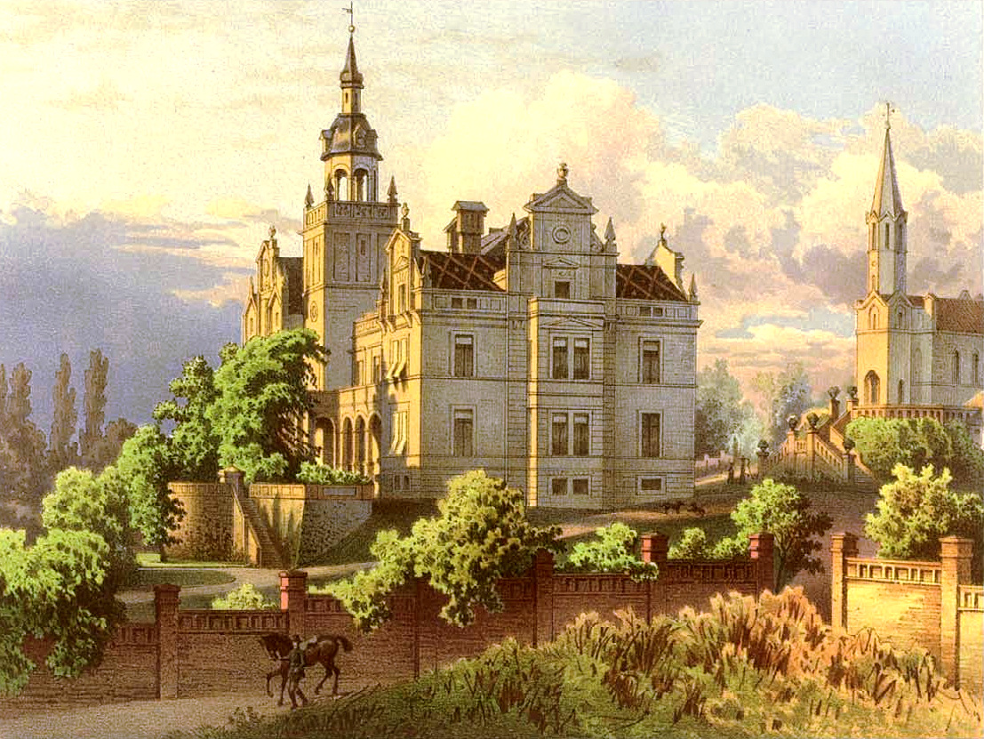 Biechów – pałac, 1863-1865, 1904